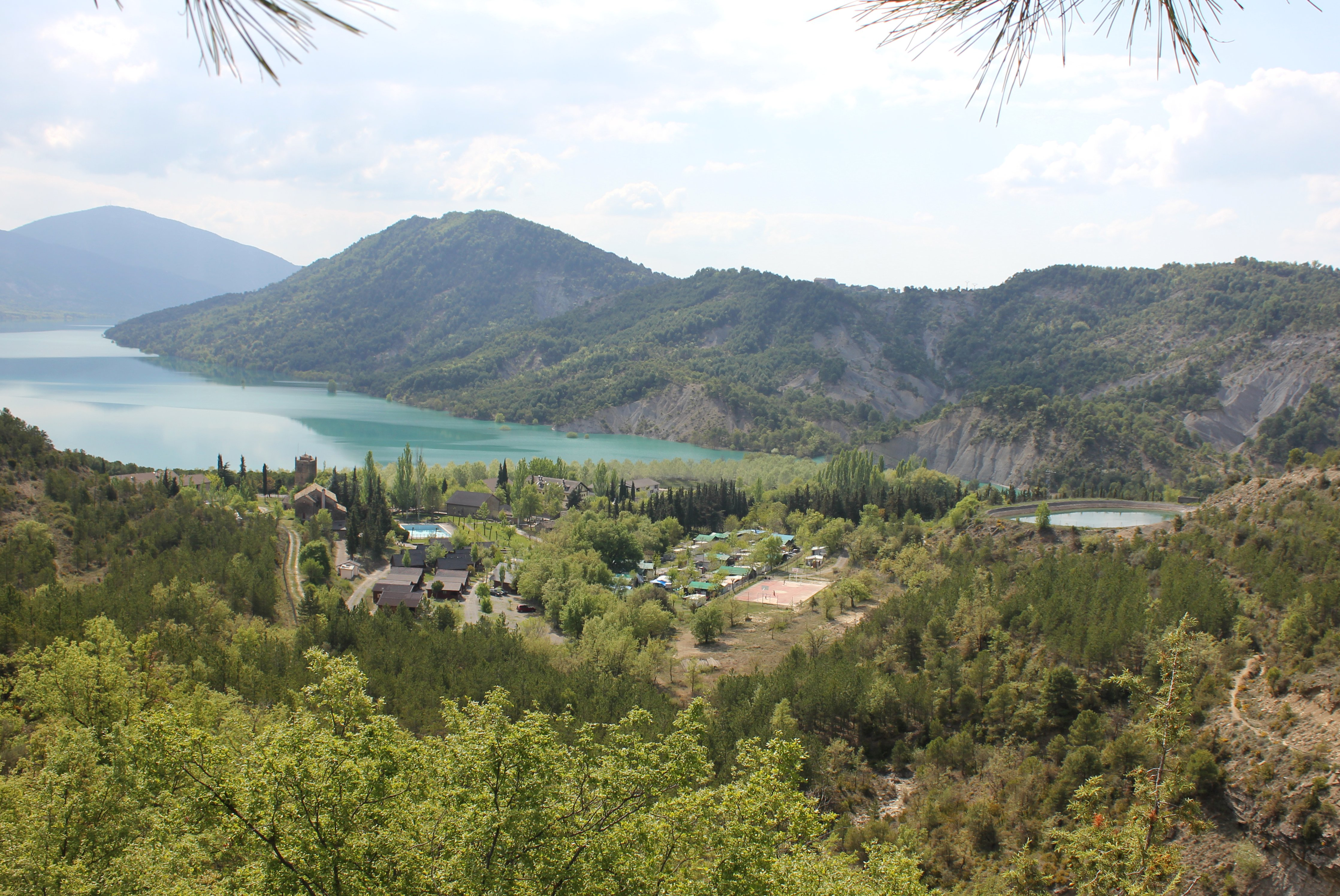 Aragonés: Moriello de Tou